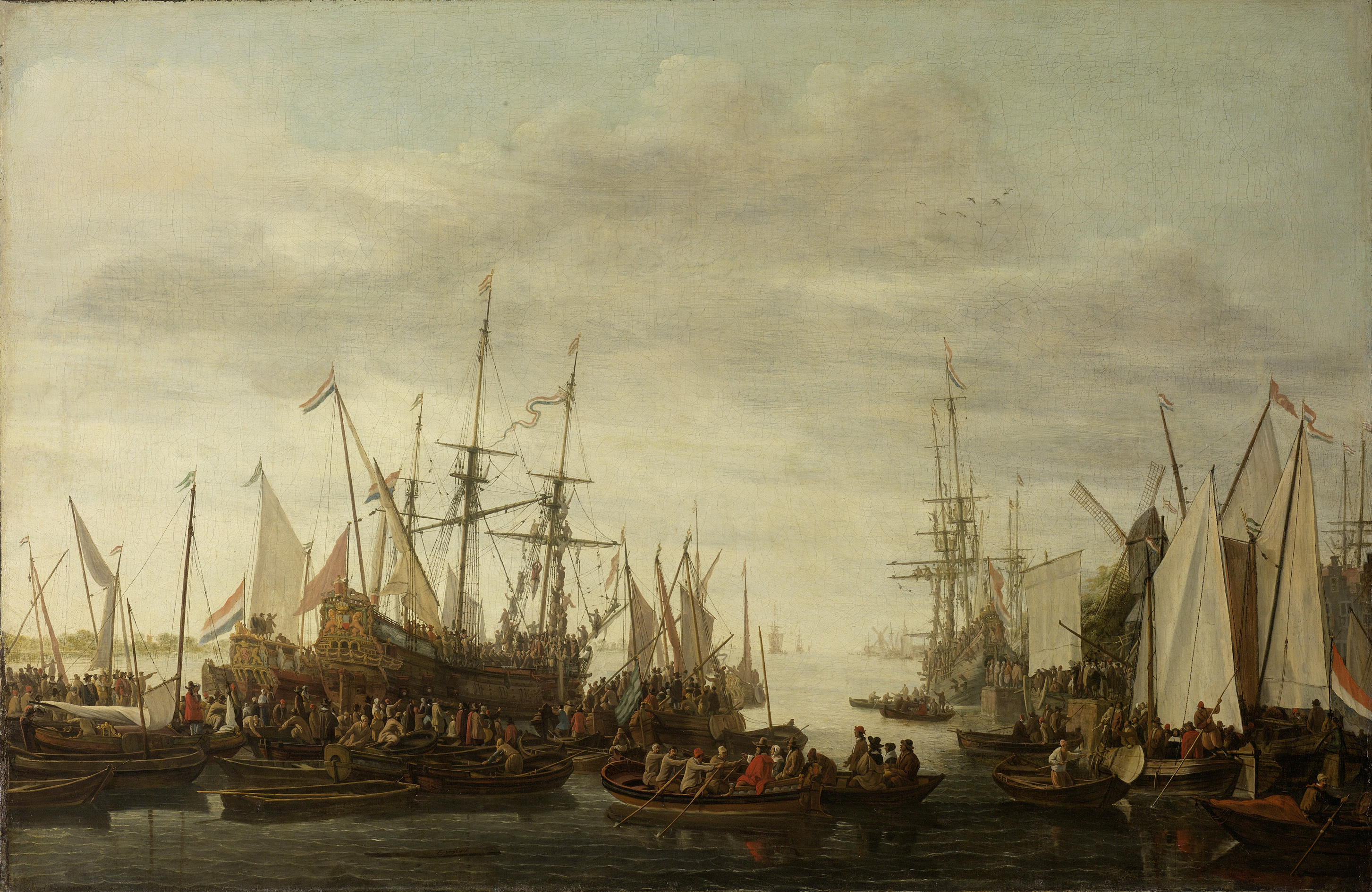 Het kielhalen (volgens overlevering) van de scheepschirurgijn van admiraal Jan van Nes. Onder grote belangstelling wordt een man op een schip links gekielhaald. Op het water bevinden zich enkele oorlogsschepen, jachten en sloepen vol met mensen. Rechts de wal met een molen en enkele huizen.; Lieve Verschuier (1623–1686), olieverf op doek, ca. 1660–1686